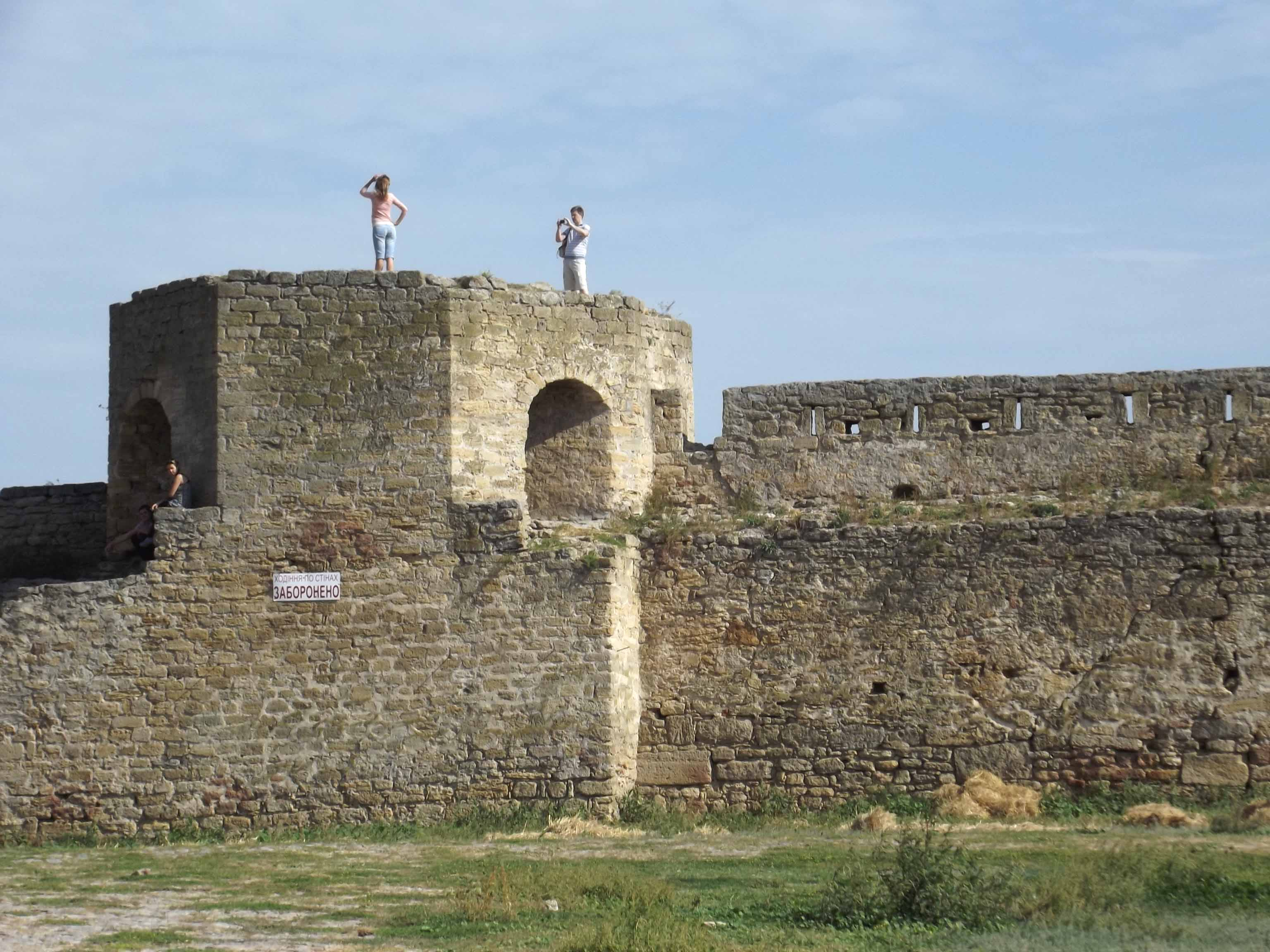 Фотосессия